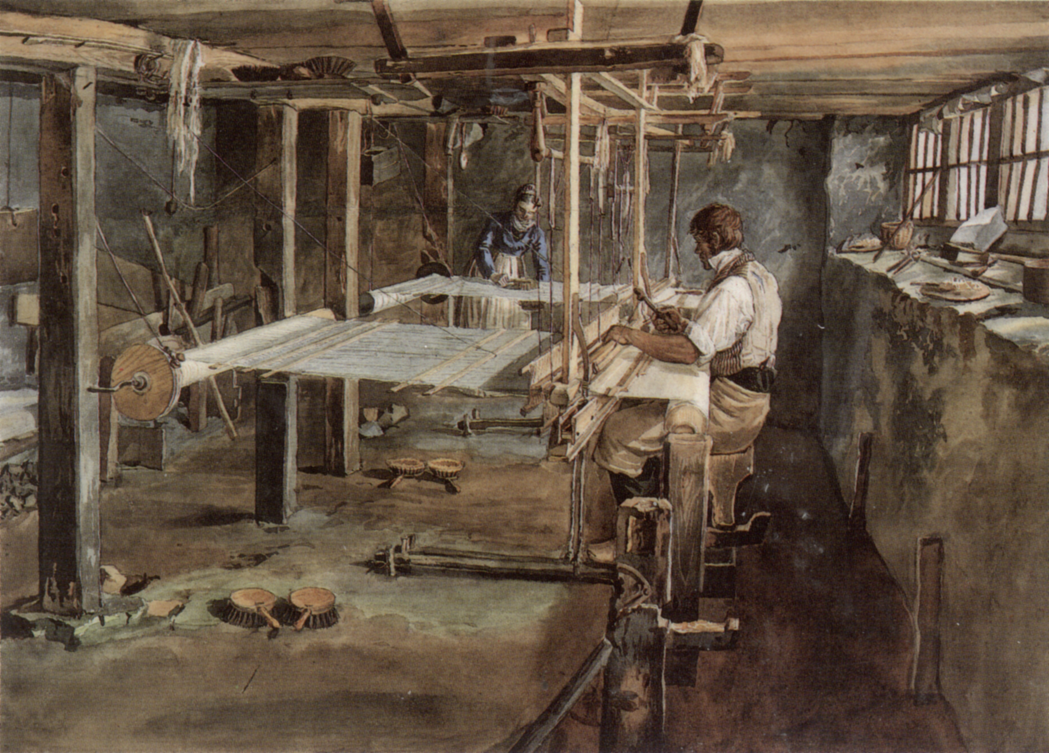 Appenzeller Weberpaar bei der Arbeit am Handwebstuhl, um 1830; Aquarell